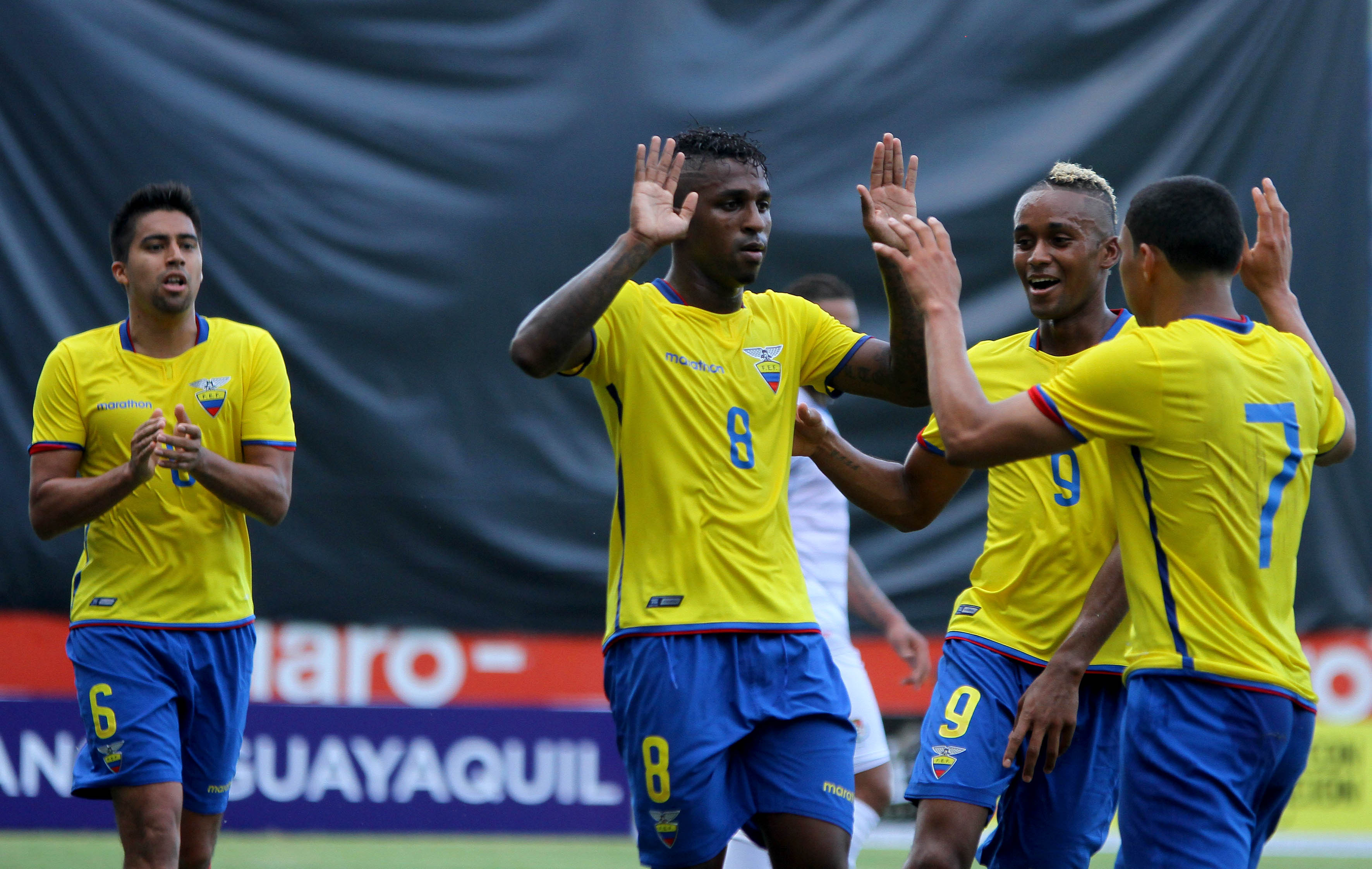 Guayaquil, 06 de jun (Andes).-En el estadio George Capwell, la selección de fútbol de Ecuador se enfrenta a Panamá en partido amistoso, en la gráfica Miller Bolaños celebra junto a sus compañeros el primer gol del equipo ecuatoriano Foto: César Muñoz/Andes